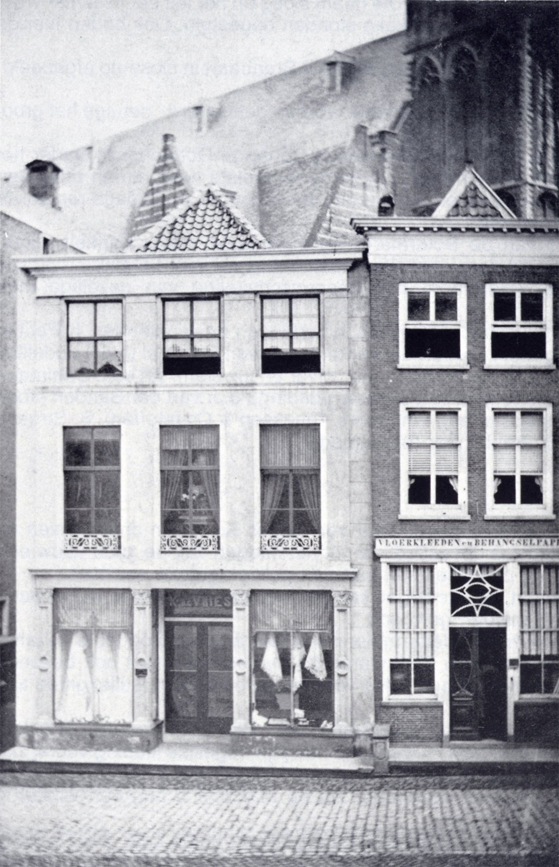 Wijdstraat 26 (hoek Kerksteeg) Gouda, rijksmonument, foto omstreeks 1867